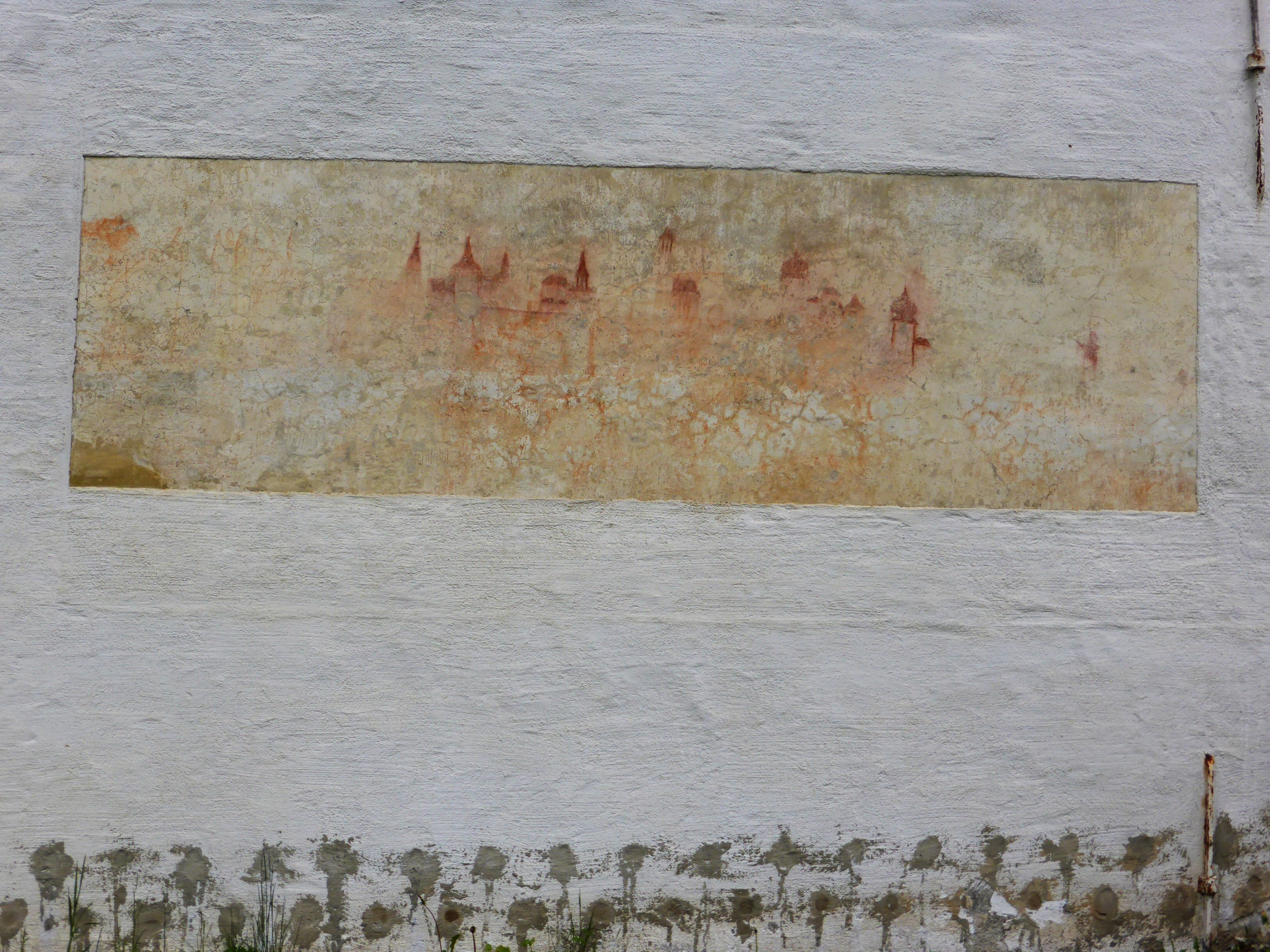 Fürstenkasten; Tauernstraßenmuseum